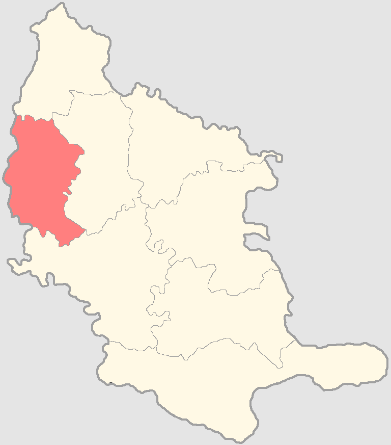 Ардатовский уезд на карте Симбирской губернии